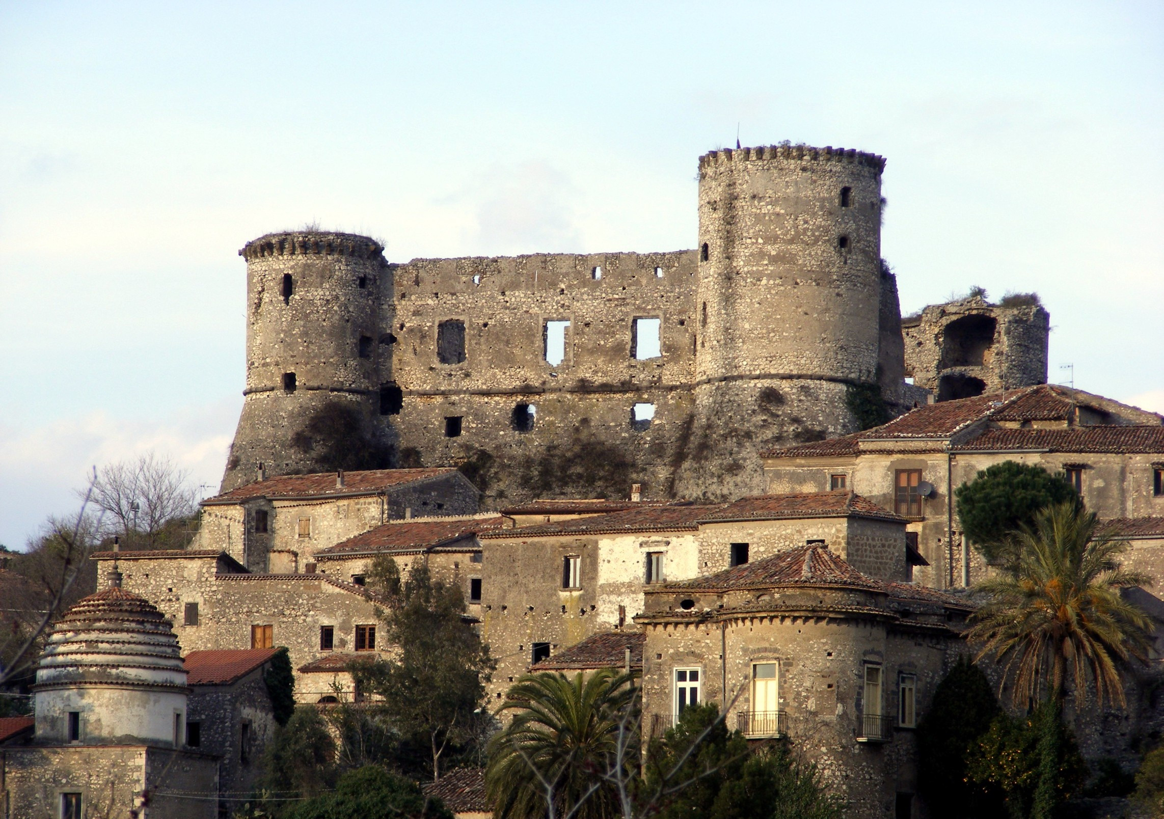 Castello medioevale di Vairano Patenora (Guglielmo D'Arezzo, autore)